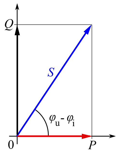 Komplex effekt